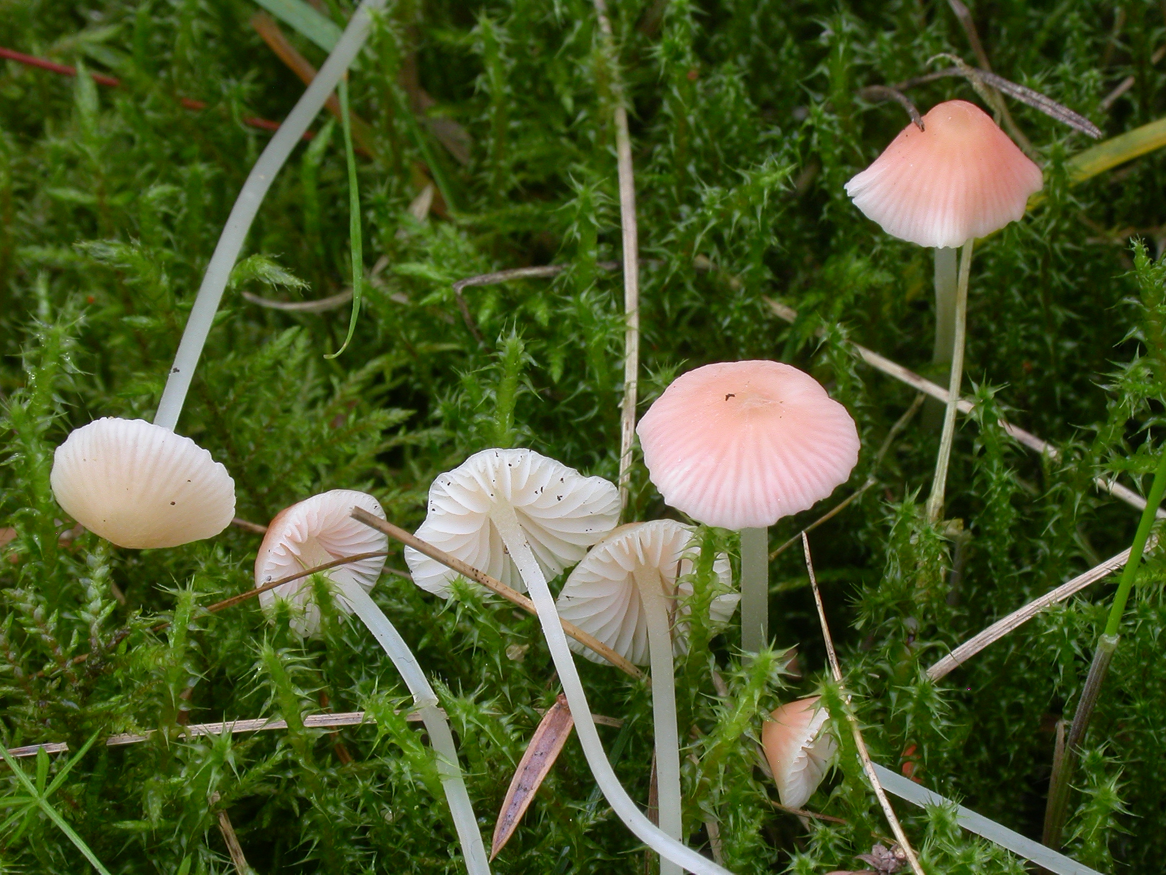 Soppar av arten prakthette (Mycena floridula).